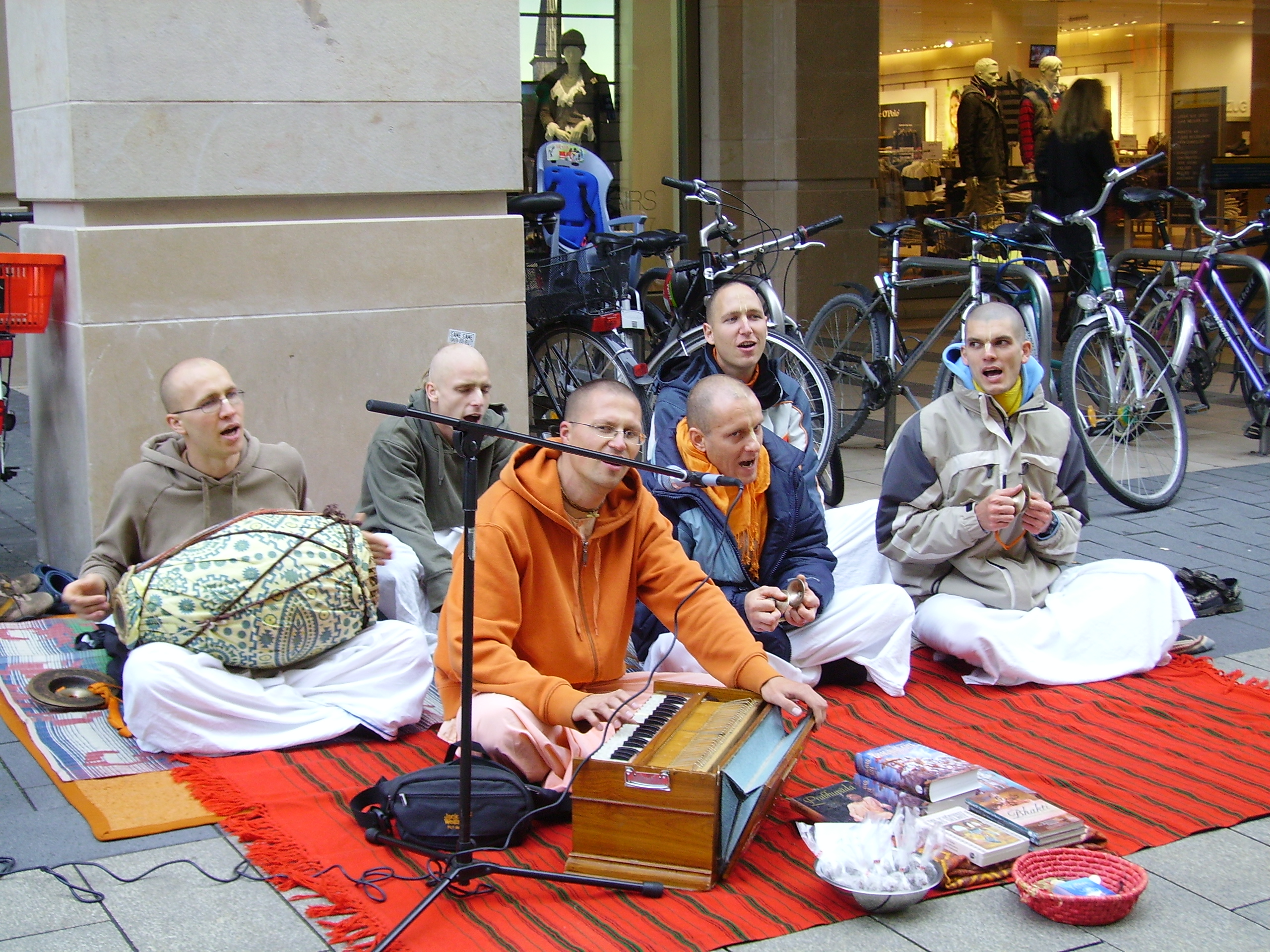 Hare Krishna devotees singing in Leipzig